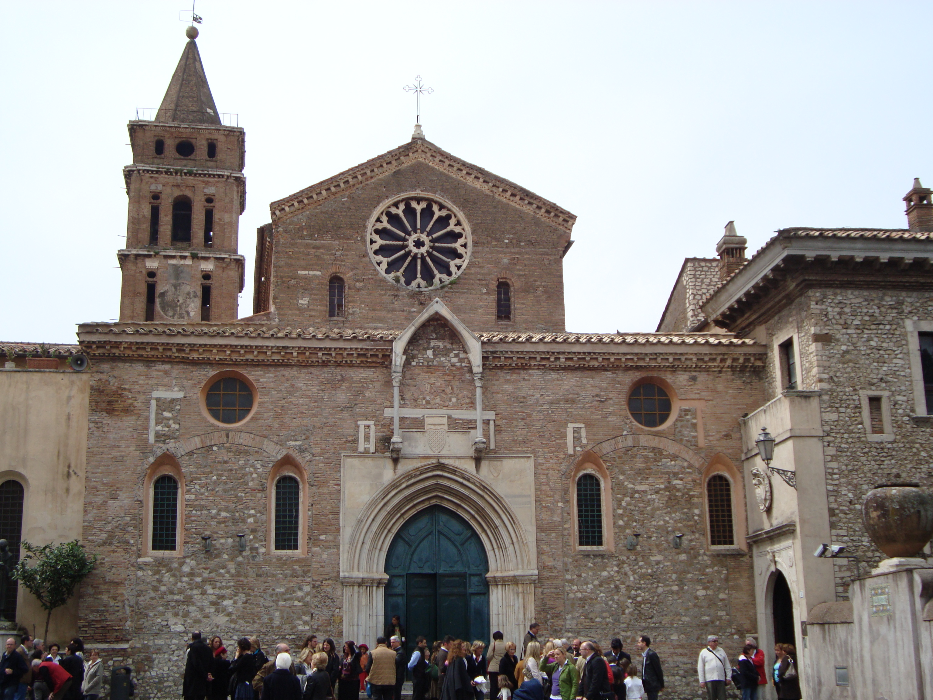 Eglise Santa-Maria Maggiore à Tivoli en Italie